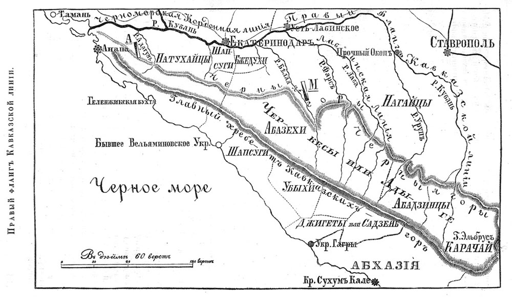 Правый фланг Кавказской линии (буквами А и М обозначены отряды Адагумский и Майкопский). Карта из статьи: Угринович К. Краткий обзор военных действий на Кавказе в минувшем 1857 году // Русский вестник. - 1858. - № 1.